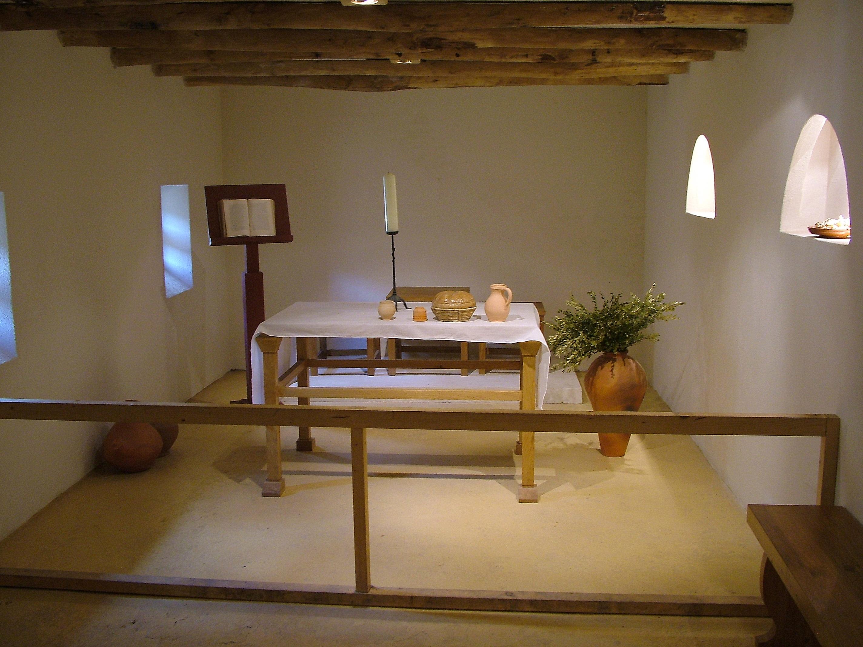 Museumpark Orientalis bij Nijmegen. Kerk, naar aanleiding van de opgravingen in Dura Europos (Romeins fort, vernietigd in het jaar 257).